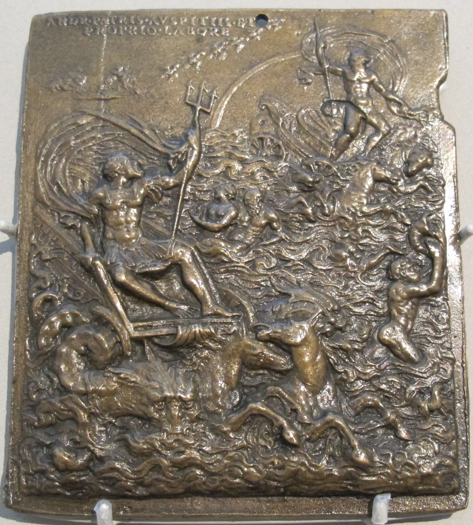 Leone leoni, trionfo allegorico di giannettino doria, 1541-42, v&a